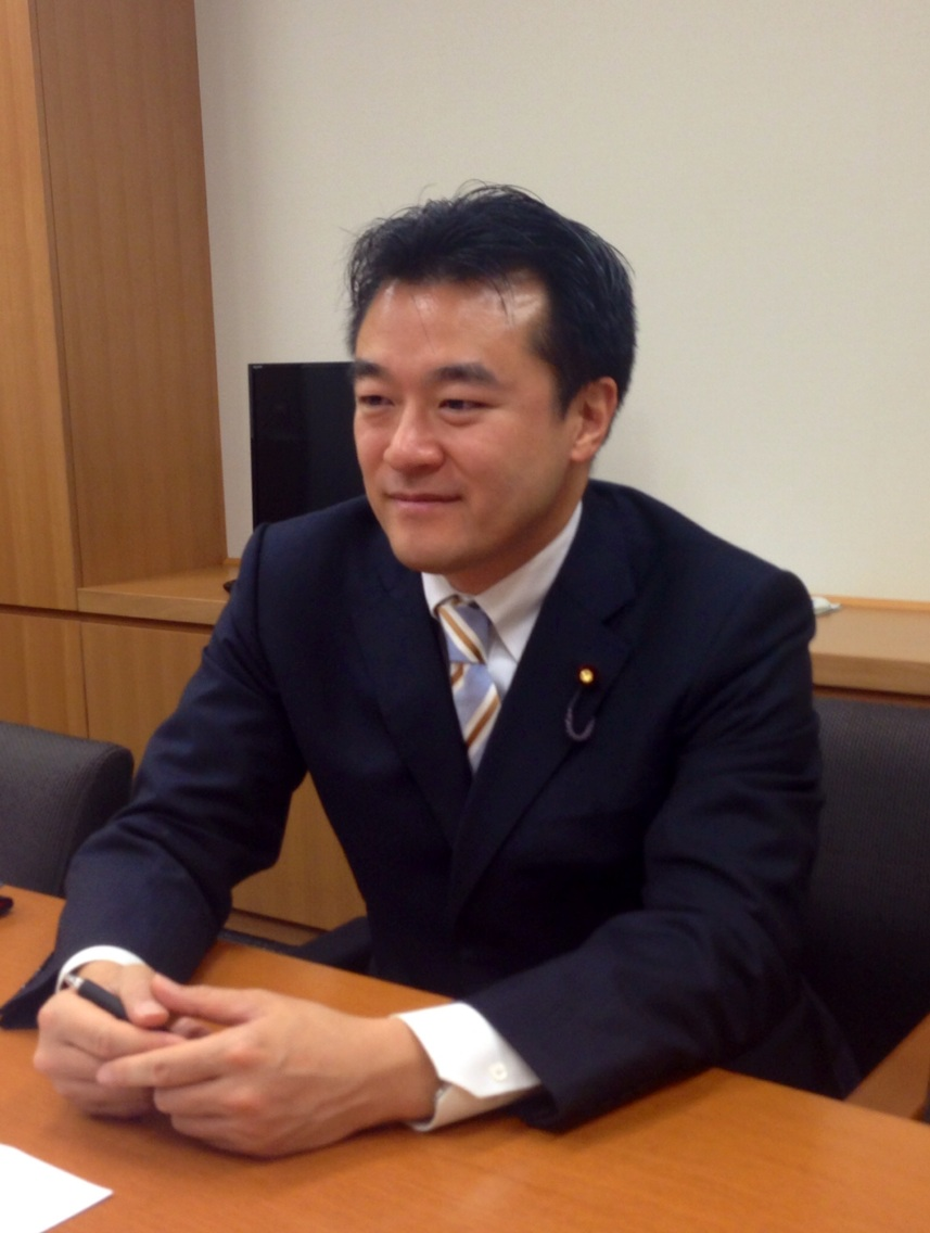 大岡敏孝先生の事務所にお伺いした際に記念写真を撮らさせていただいた際の画像